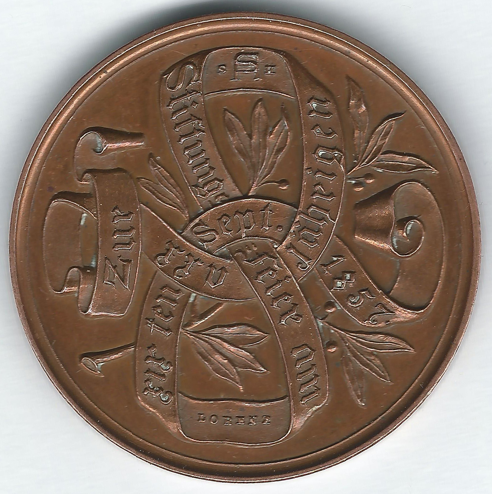 Medaille aus Bronze zum 25-jährigen Stiftungsfest des Hamburger Künstlervereins (19. September 1857). Entwurf Hermann Wilhelm Soltau (Monogramm oben im Band: HS), geprägt von Heinrich Lorenz (vermutlich in der Königlichen Münze zu Altona, dessen Leiter Lorenz zu diesem Zeitpunkt war). Durchmesser: 3,3 cm. Gewicht 13,6 Gramm. (Scan)